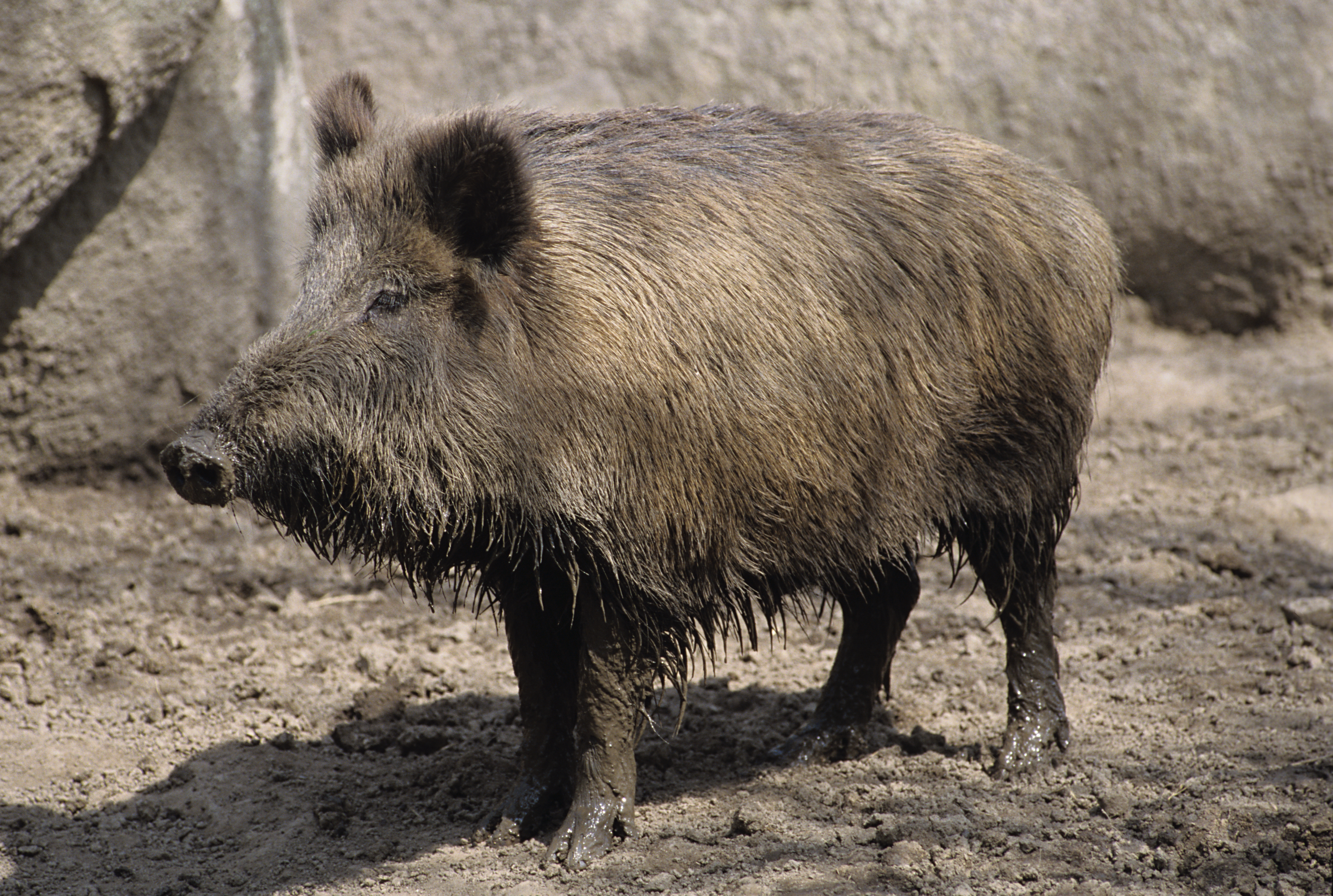 Jabalí